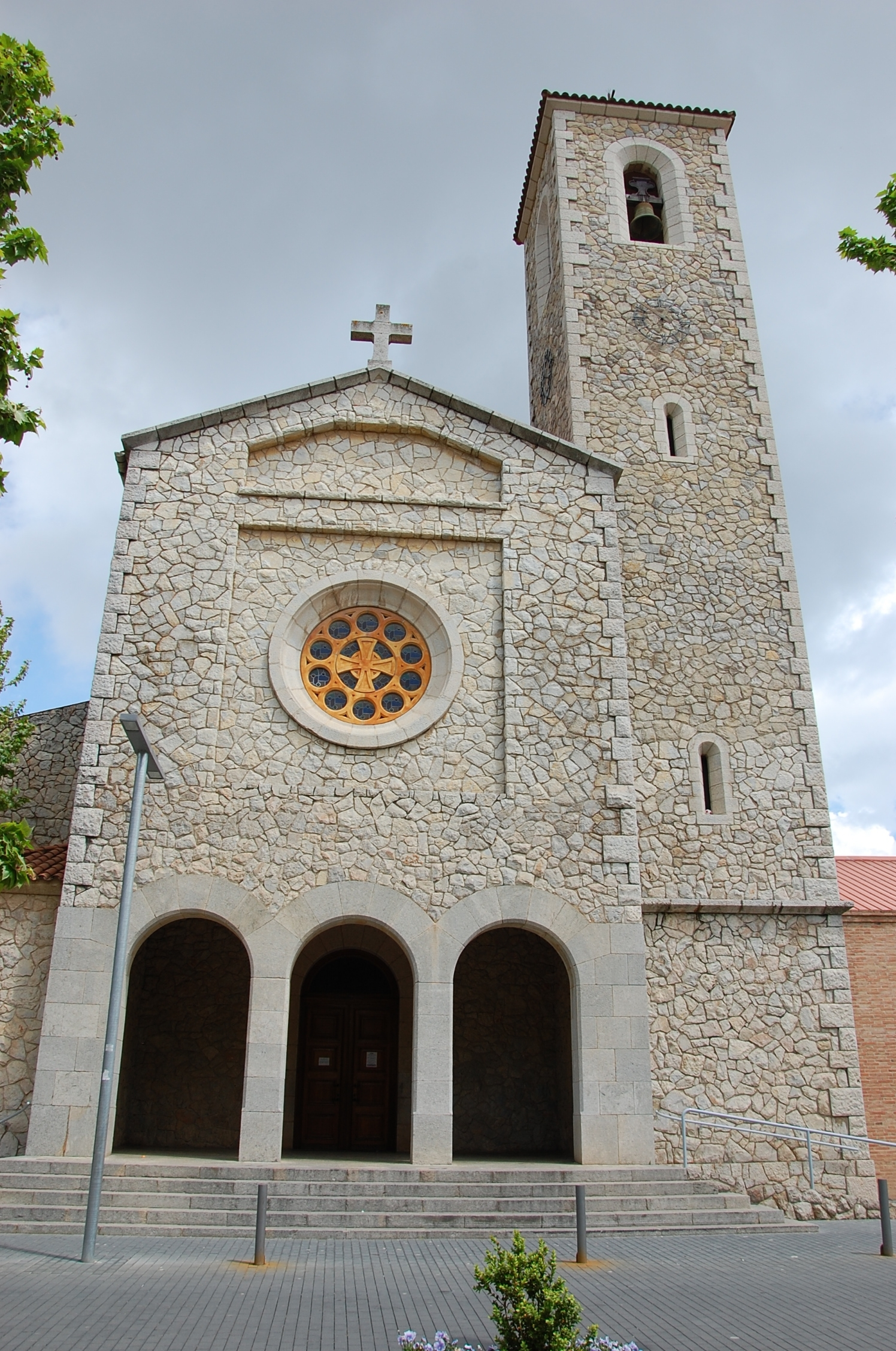 Fachada de la iglesia parroquial de san cristóbal de Begues (Barcelona)